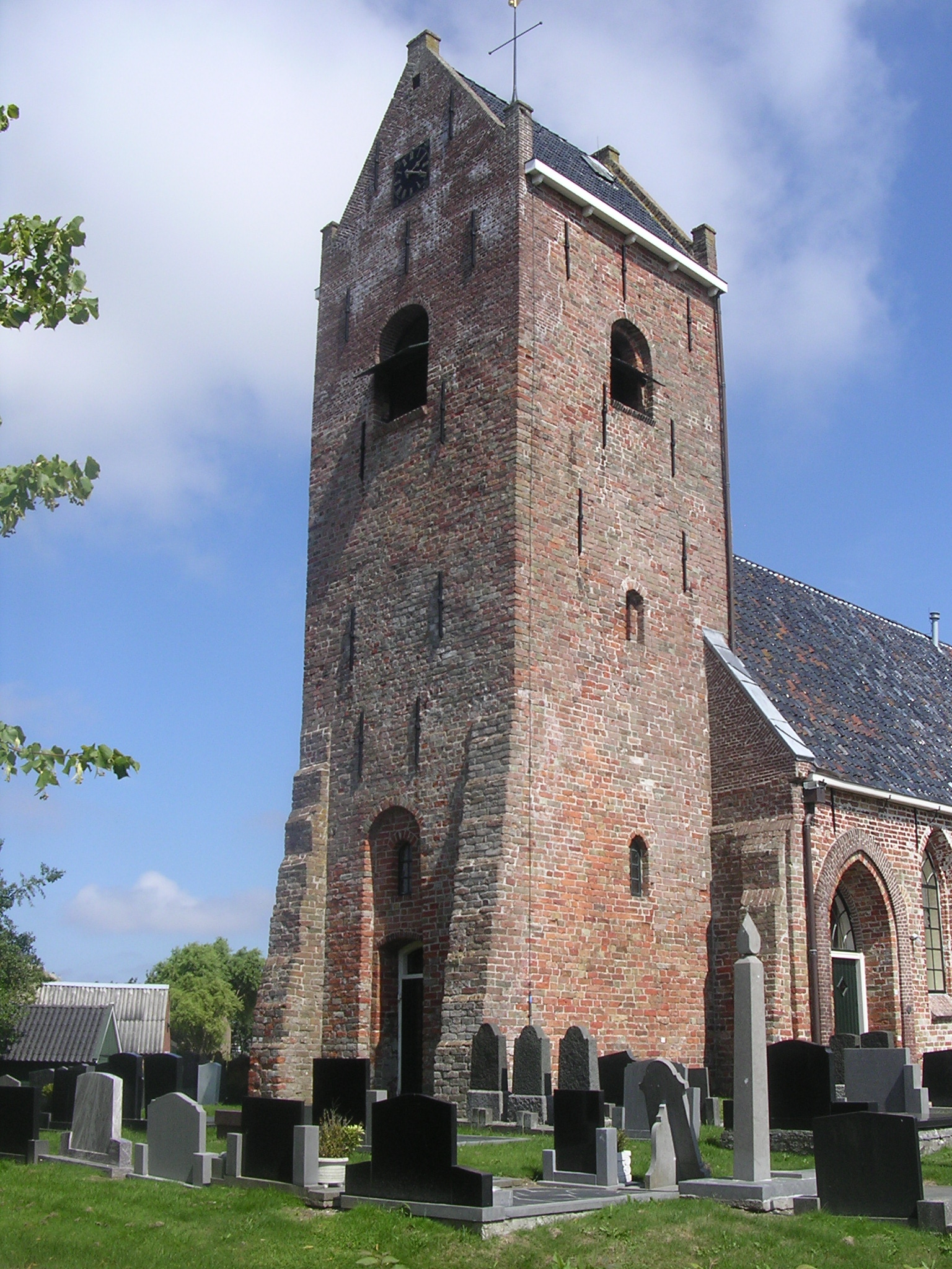 kerk Nes (Dongeradeel)